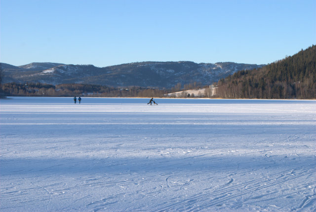 Hillestadvannet sett fra Kronlia, Holmestrand